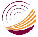 Alto Comisionado de Planificación de Marruecos